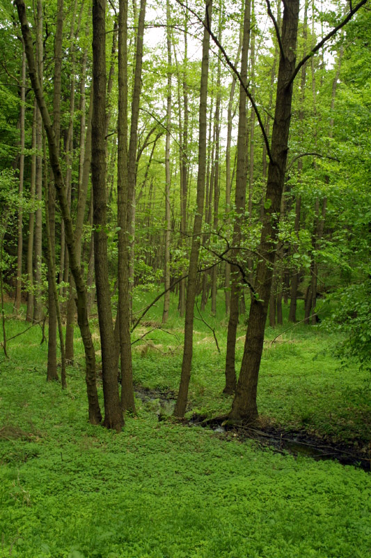 Potok Bělidlo mezi Třebekovem a Třebokovem.